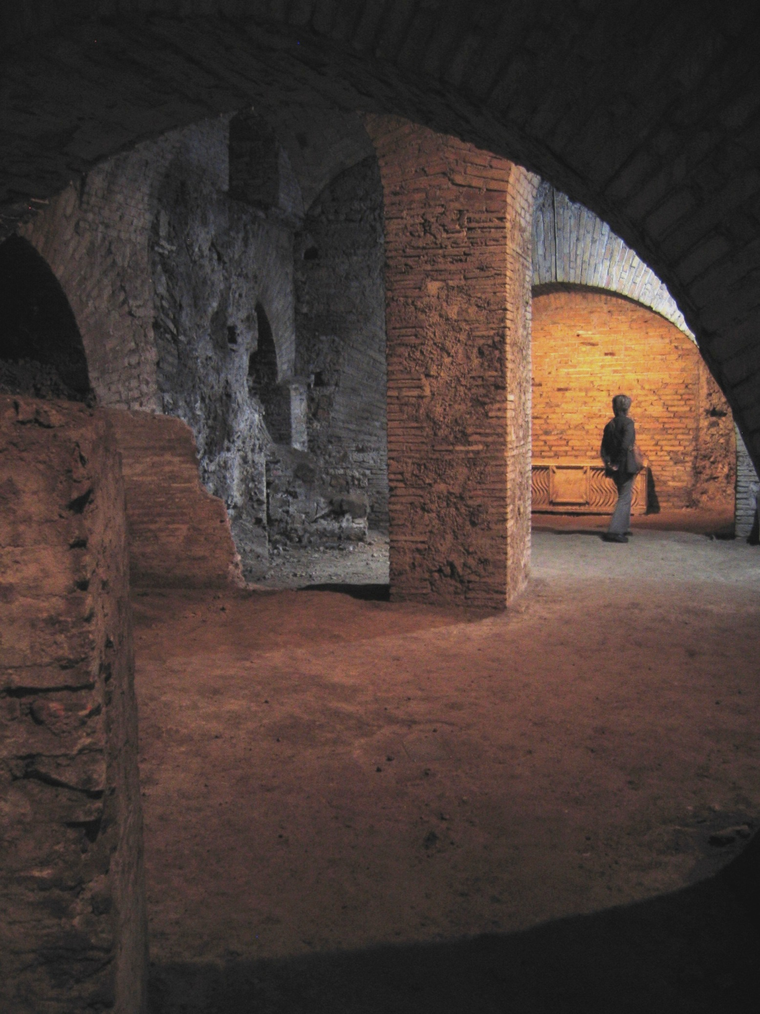 Italie Rome Basilique San Crisogono Crypte